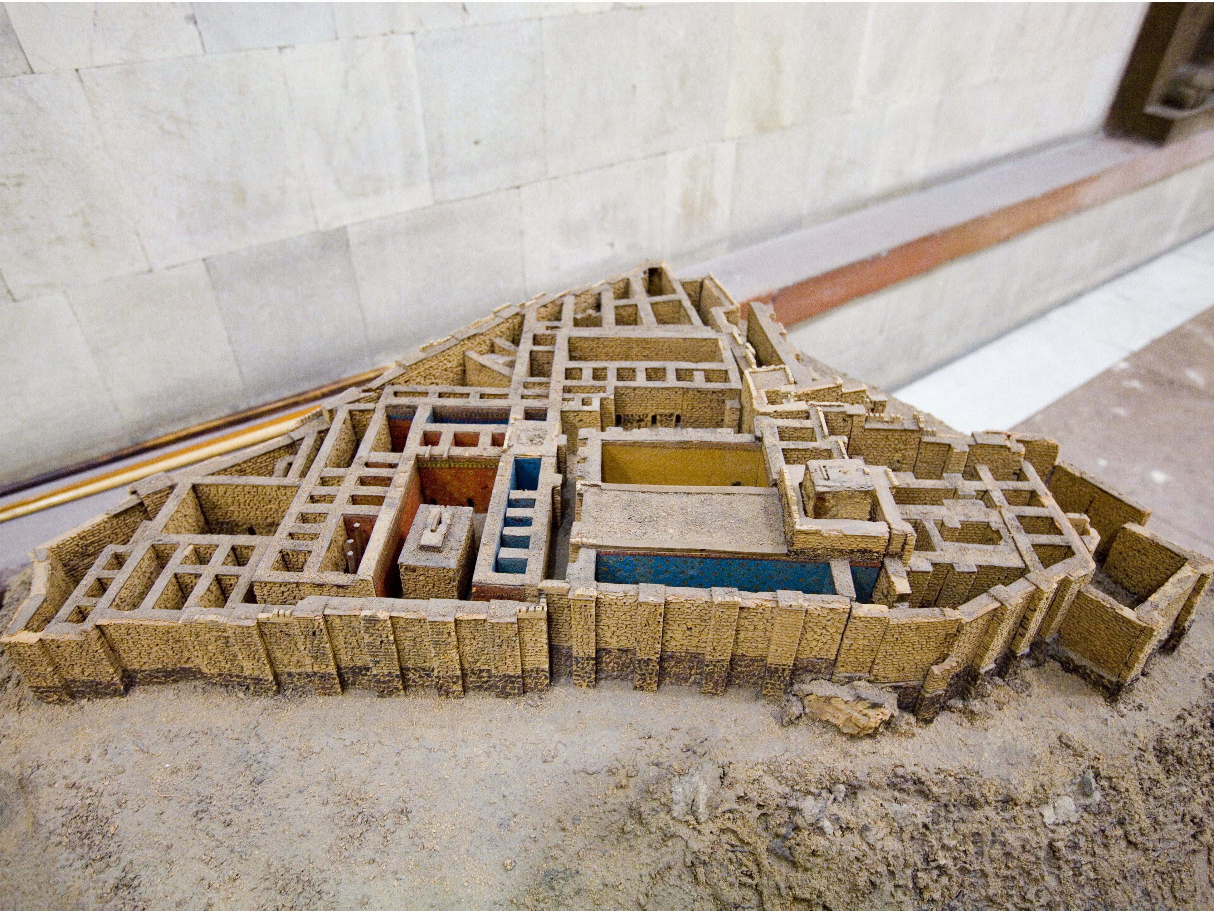 Erebuni model